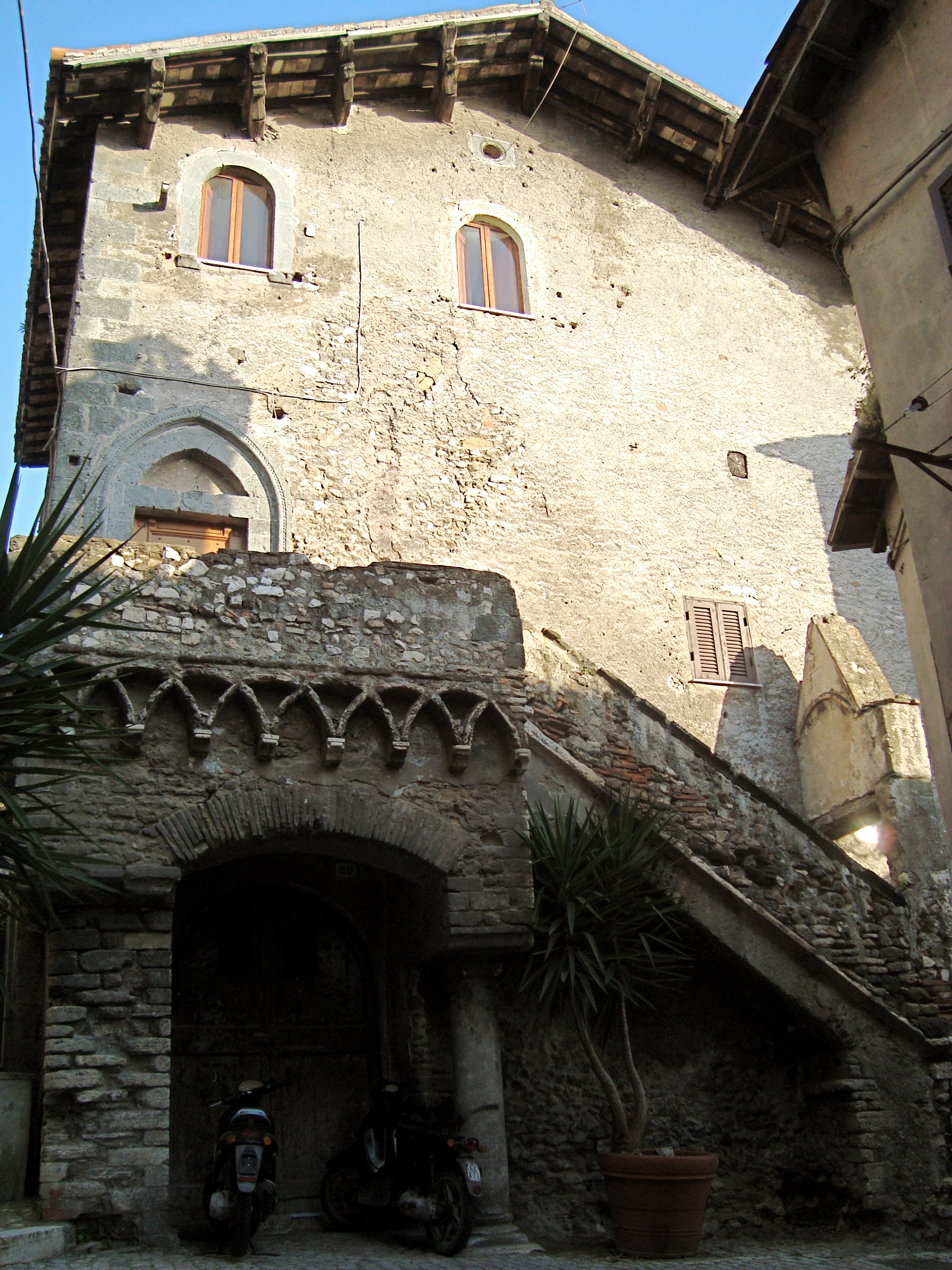 La Casa Gotica (XIIIe siècle) de Tivoli.